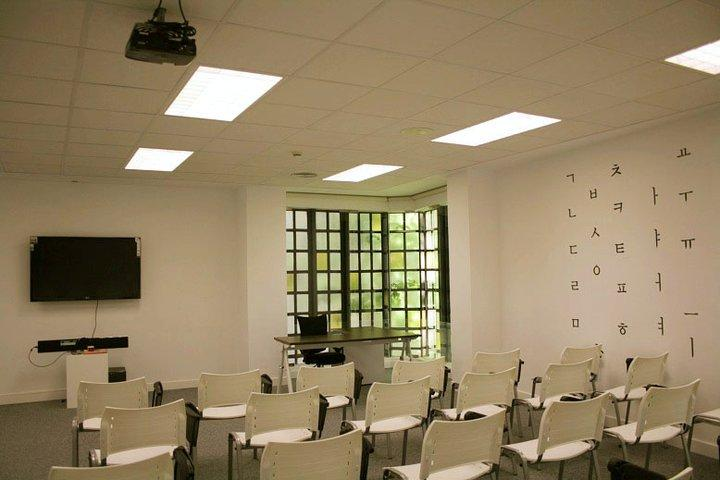 Aula de Hangul2